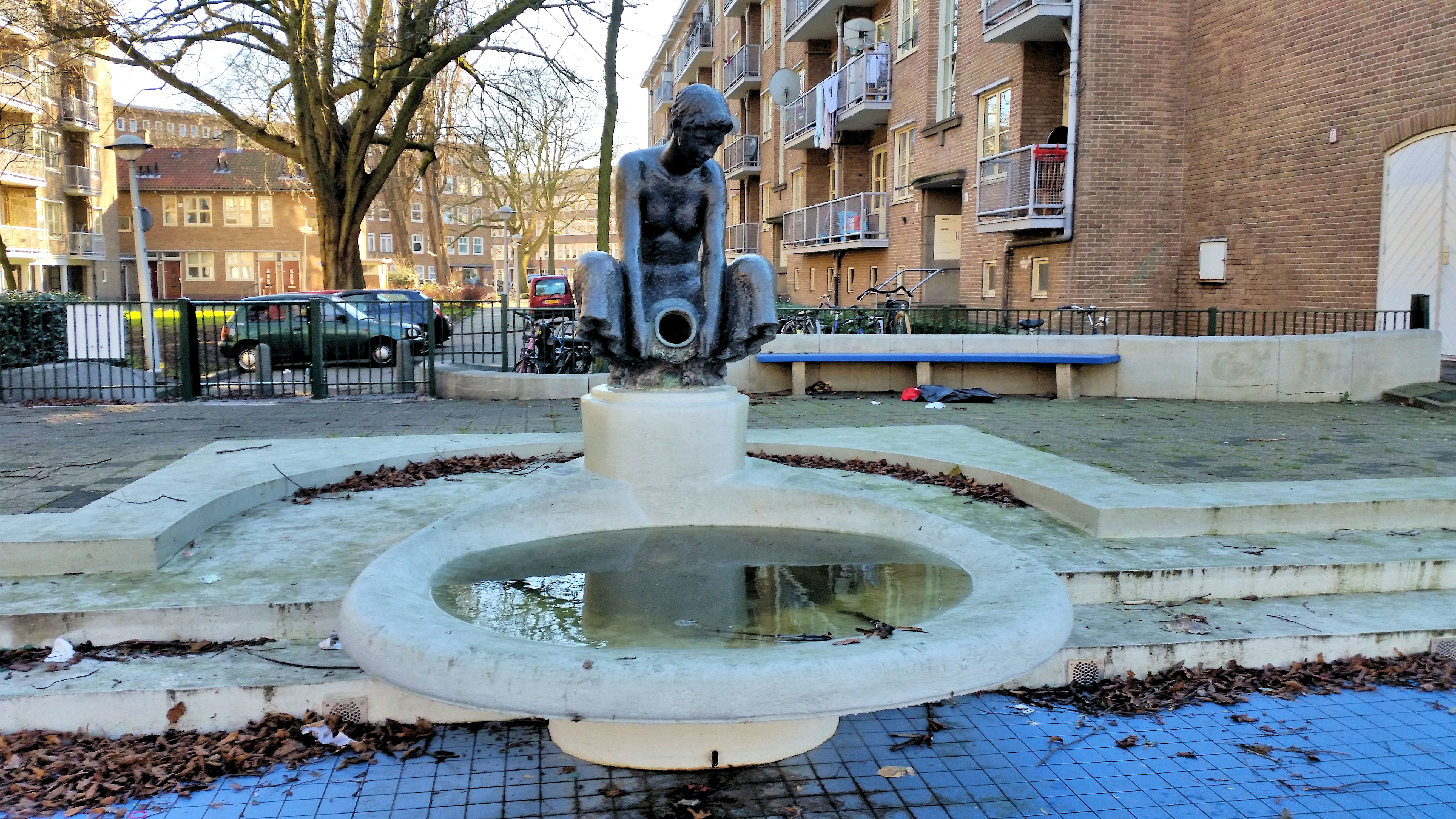 Gibraltarbadje